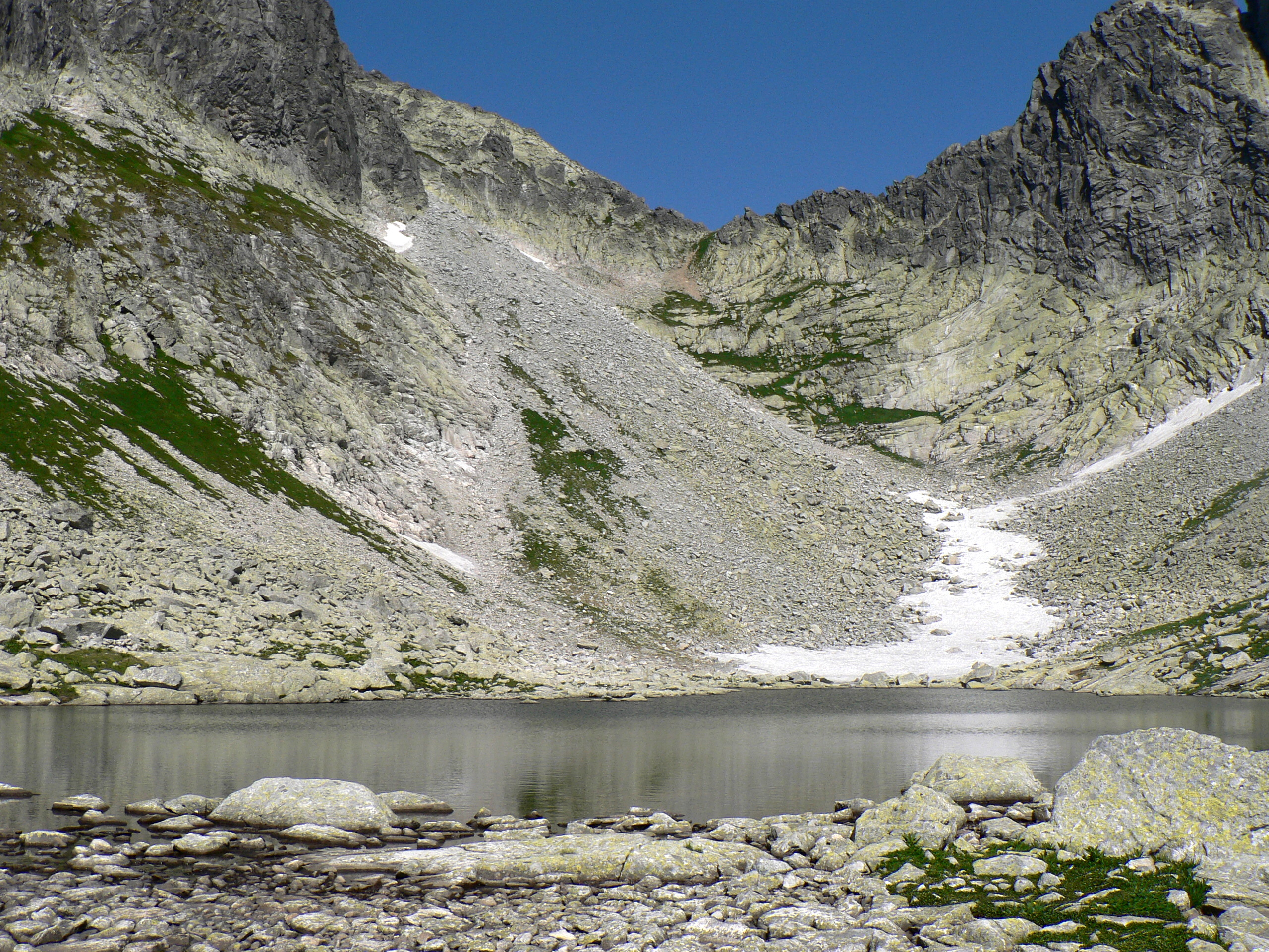 Pośredni Siwy Staw, nad nim Jaworowa Przełęcz